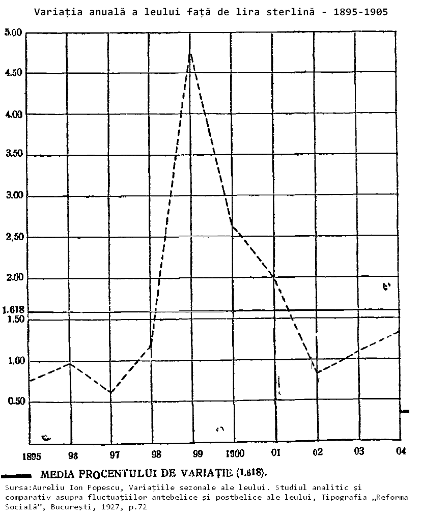 Variaţia cursului de schimb al leului 1895-1905 Sursa:Aureliu Ion Popescu, Variaţiile sezonale ale leului. Studiul analitic şi comparativ asupra fluctuaţiilor antebelice şi postbelice ale leului, Tipografia „Reforma Socială”, Bucureşti, 1927 Restricţii: Fără restricţii datorită vechimii